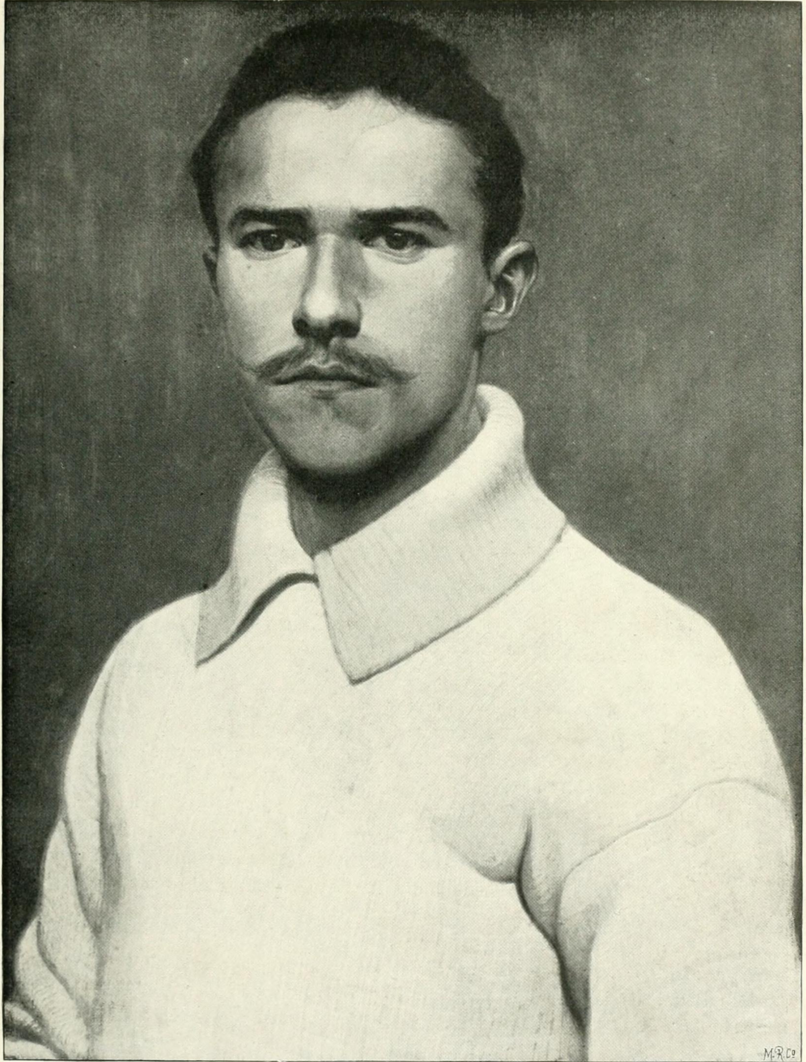 1899 (measurements unknown)